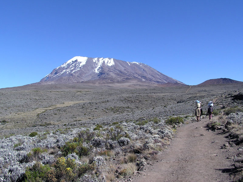 Kibo summit of Mt Kilimanjaro.